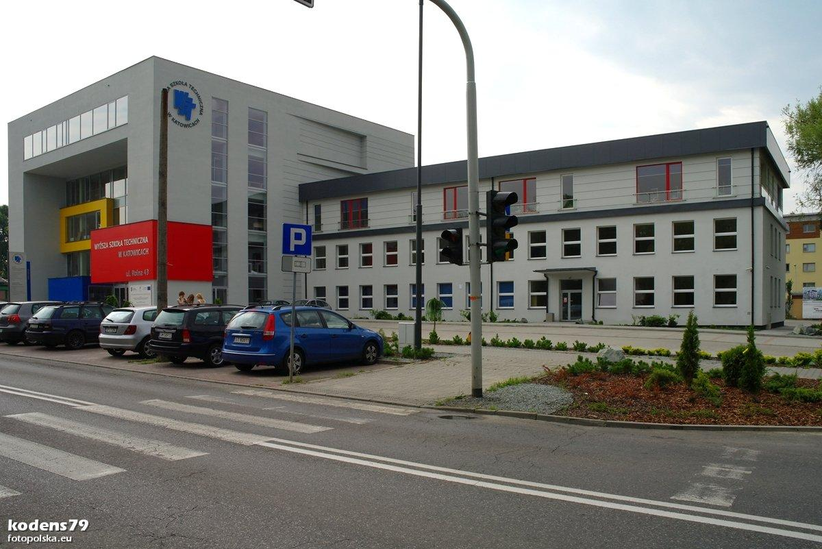 Wyższa Szkoła Techniczna w Katowicach